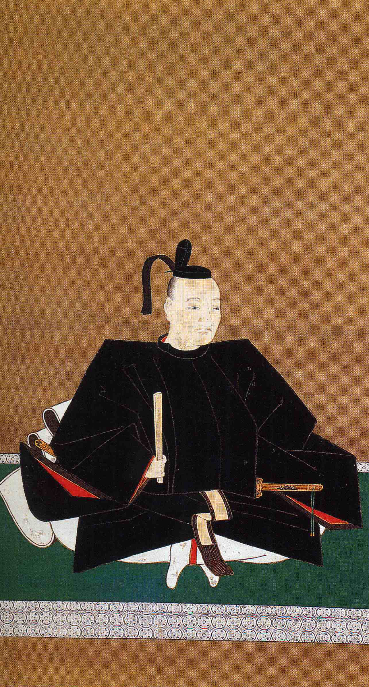 織田信雄画像 総見寺蔵 96.2×52.7 絹本著色